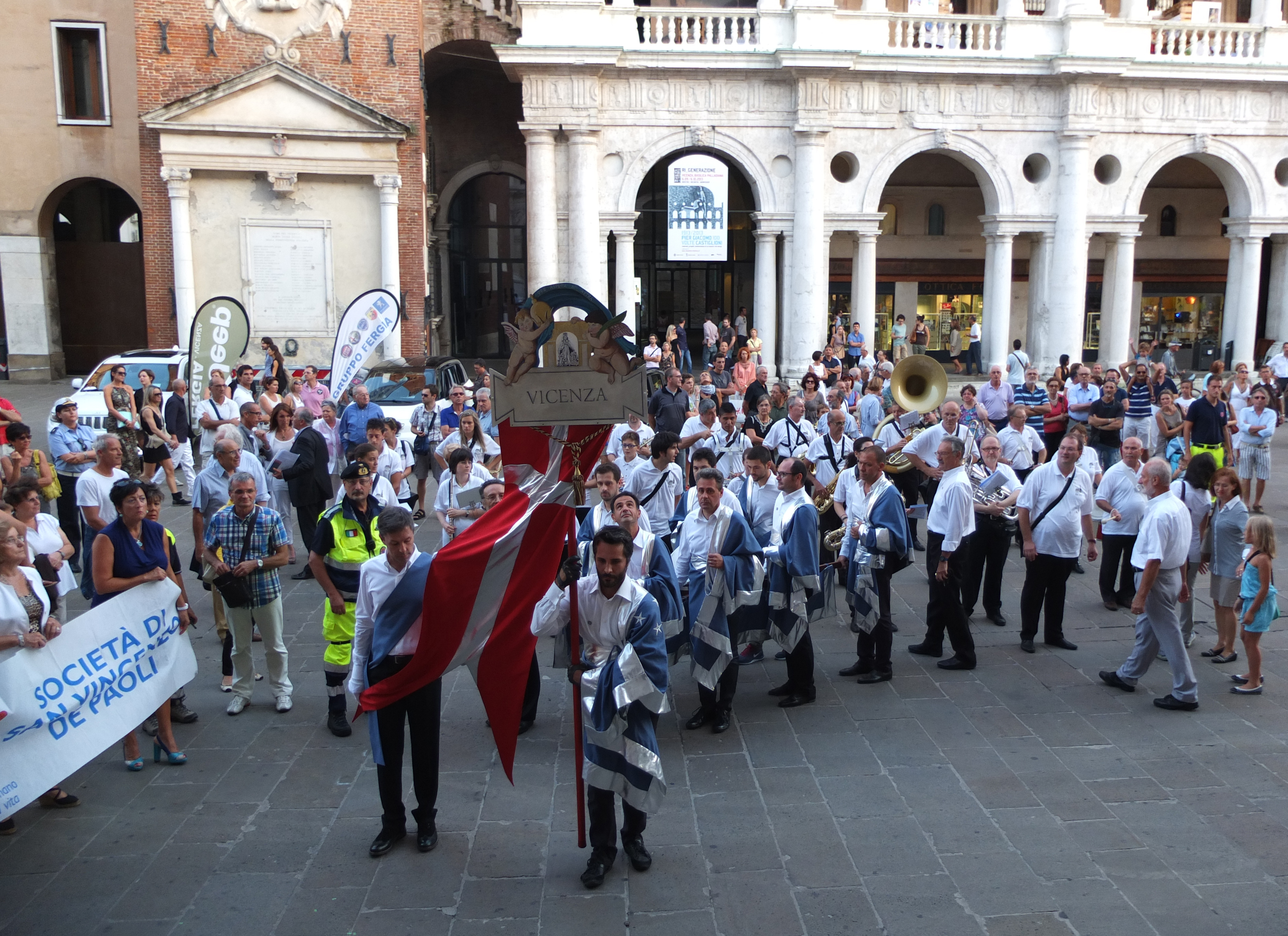 Il primo Trasporto del Gioiello di Vicenza verso il Santuario di Monte Berico. Qui il momento dell'ingresso dell'ex voto e del Gonfalone nel Santuario di San Vincenzo, in Piazza dei Signori a Vicenza.